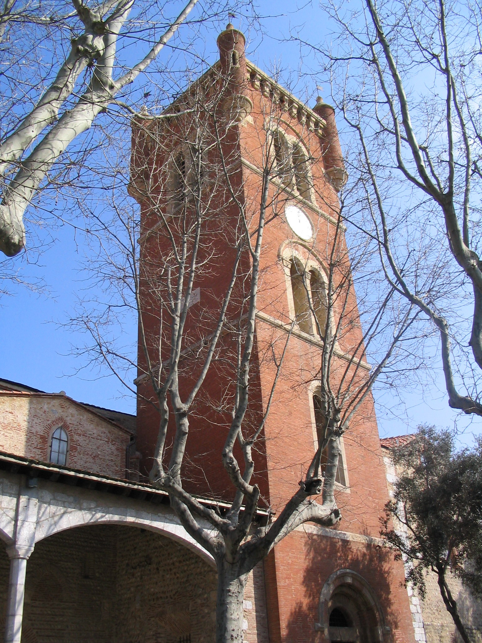 Église Saint-Jacques de Perpignan (Pyrénées-Orientales, 66)